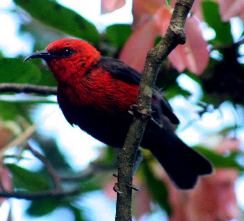 Micronesian Myzomela (Myzomela rubratra) Saipan